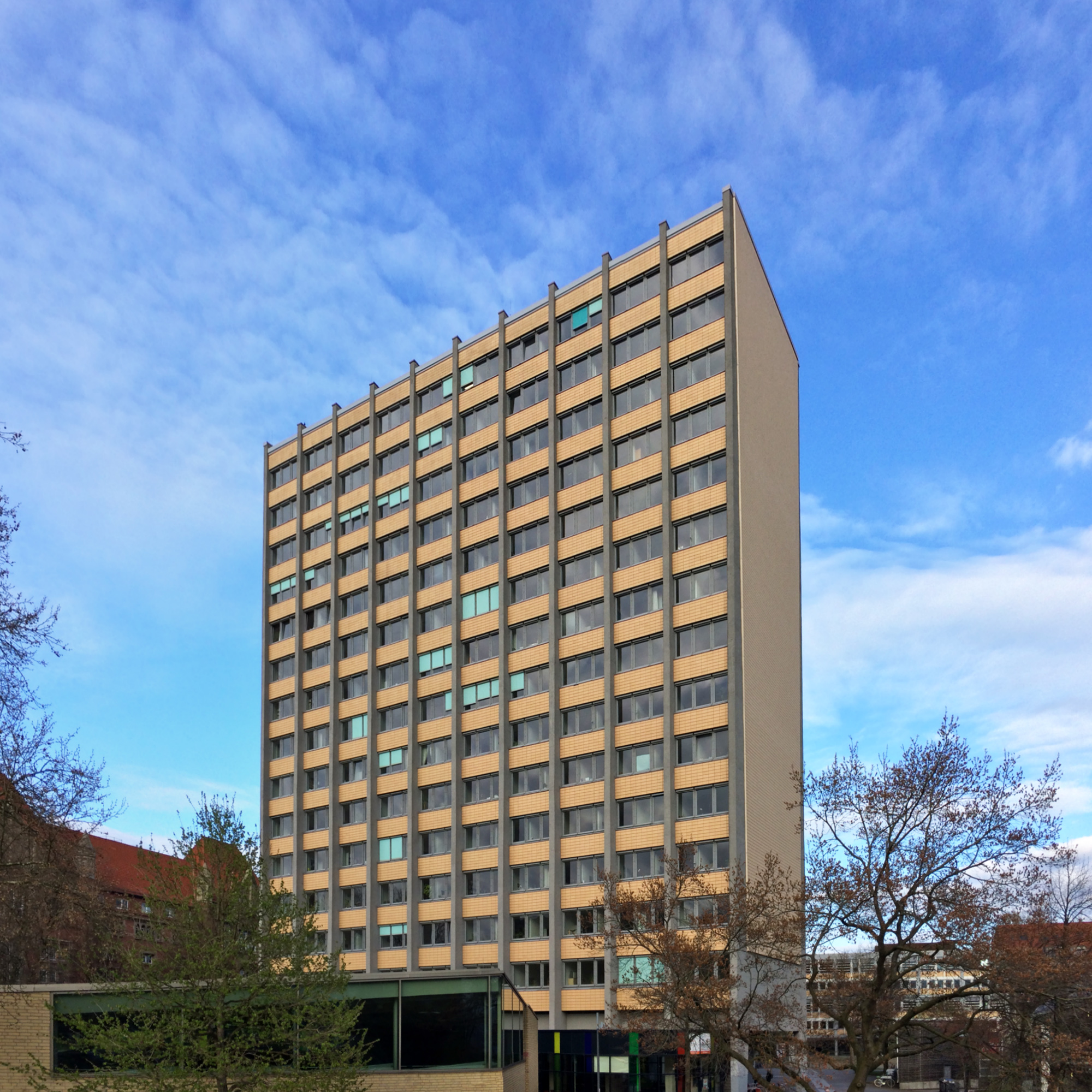 Fakultätsgebäude der geisteswissenschaftlichen Institute der Universität Hamburg »Phil-Turm«, 1960–1963, Paul Seitz, Von-Melle-Park, Hamburg-Rotherbaum